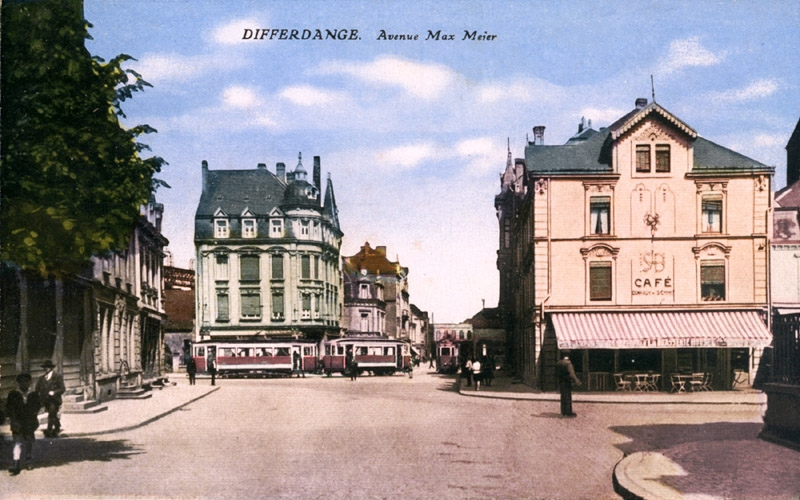 Ansicht der "Avenue Max Meier" in Differdingen (um 1910/20; wurde um 1936 in "Rue Emile Mark" umbenannt).